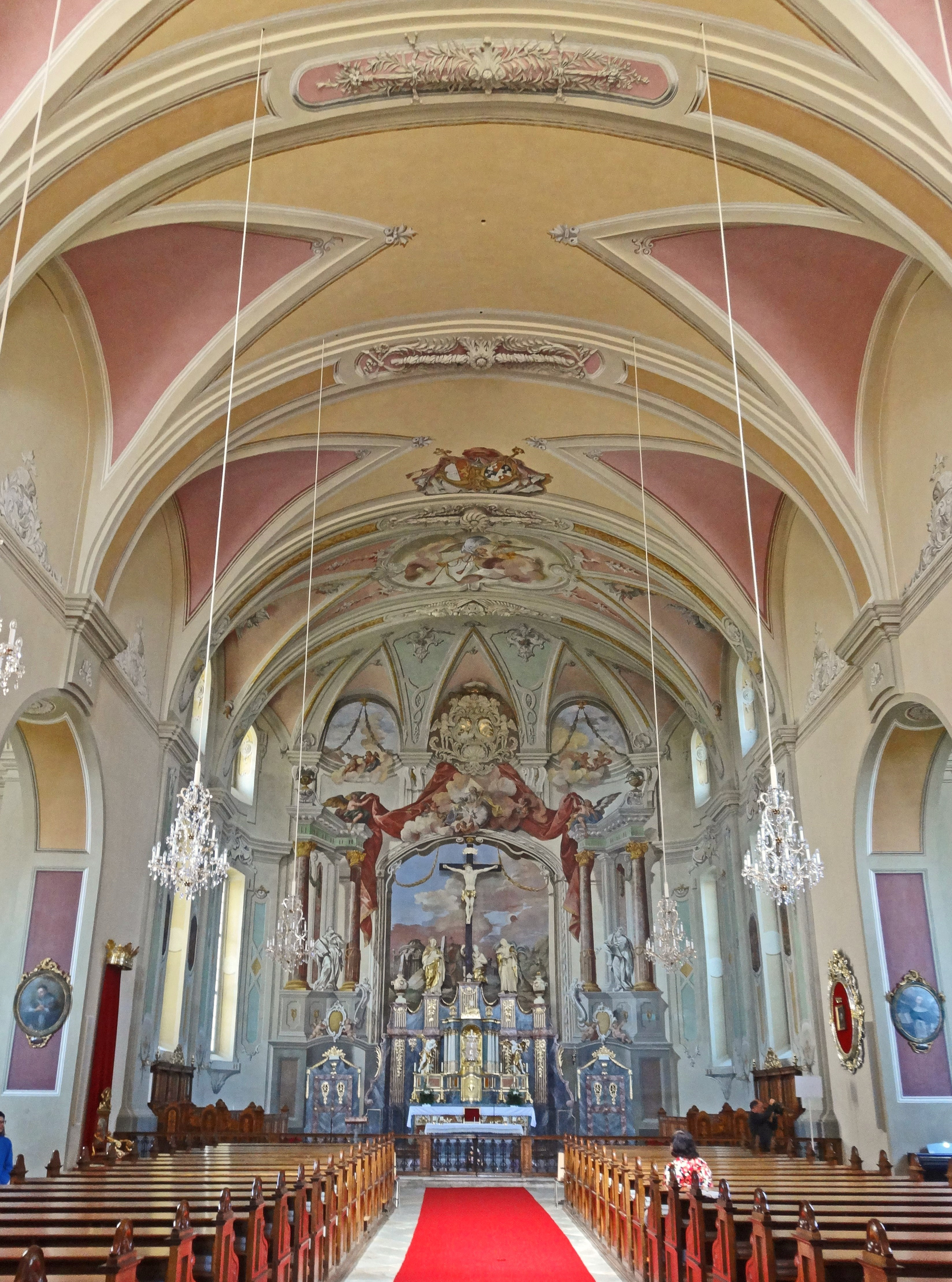 Basilika Maria Loreto (St. Andrä im Lavanttal), Innenansicht